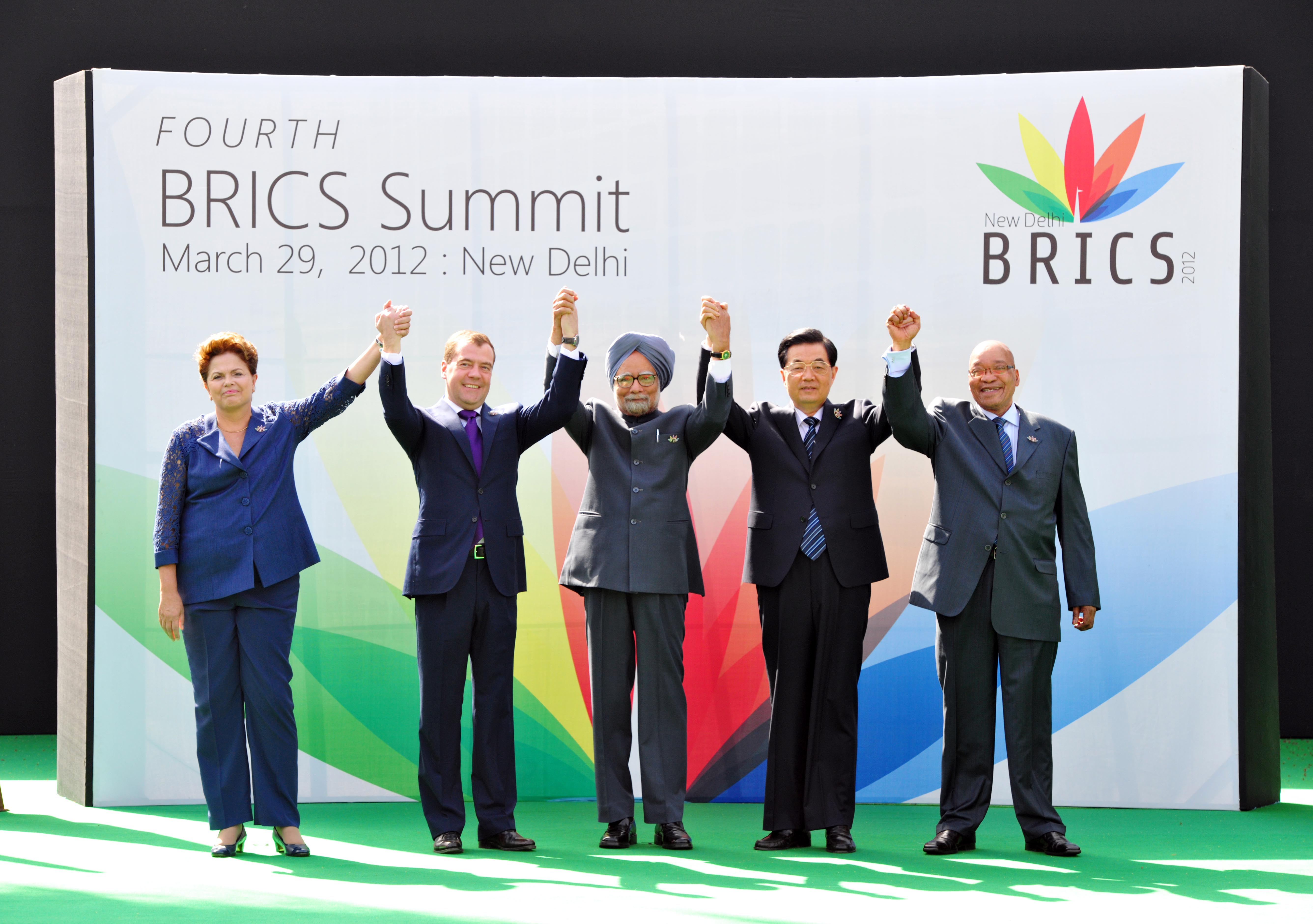 Участники саммита БРИКС: Президент Бразилии Дилма Роуссефф, Дмитрий Медведев, Премьер-министр Индии Манмохан Сингх, Председатель Китайской Народной Республики Ху Цзиньтао и Президент Южно-Африканской Республики Джейкоб Зума.